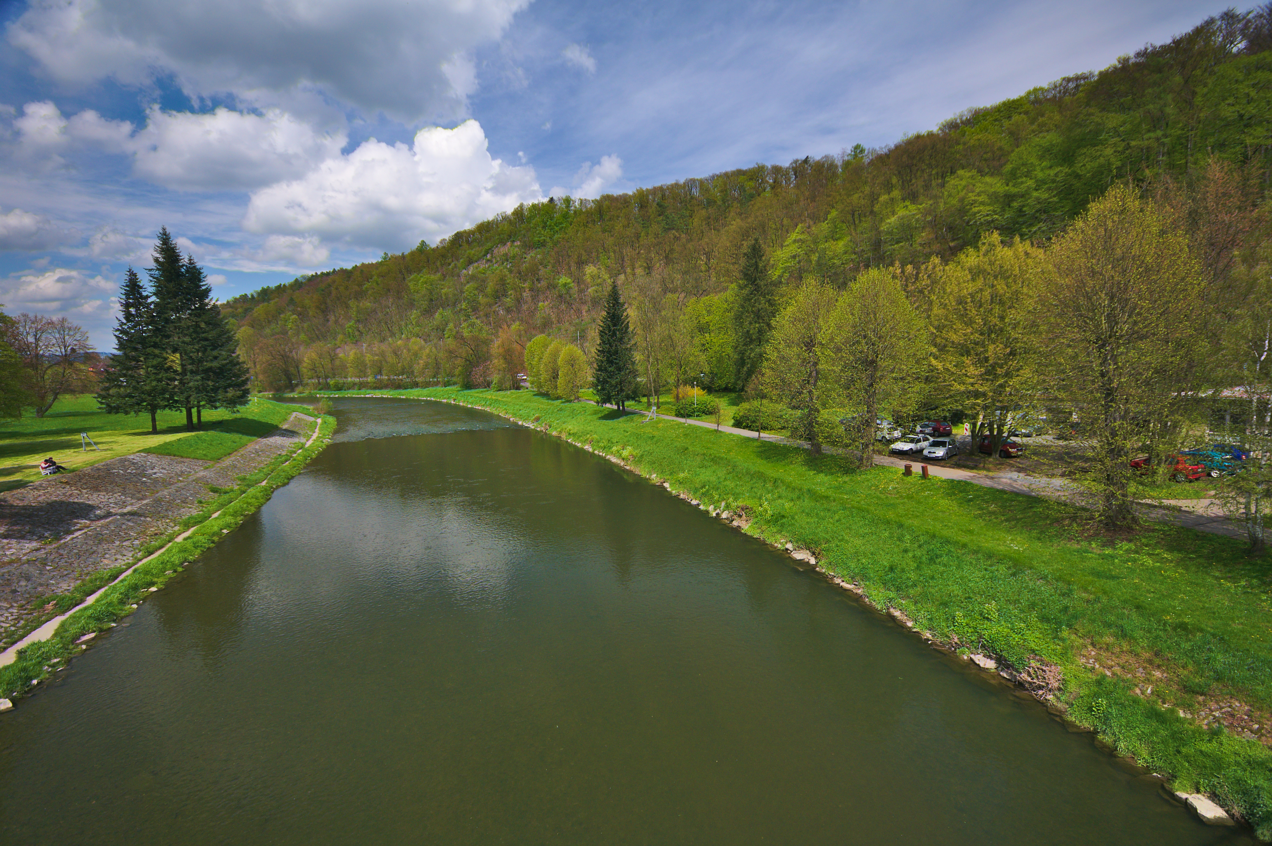 Řeka Bečva z mostu u lázní, Teplice nad Bečvou, okres Přerov